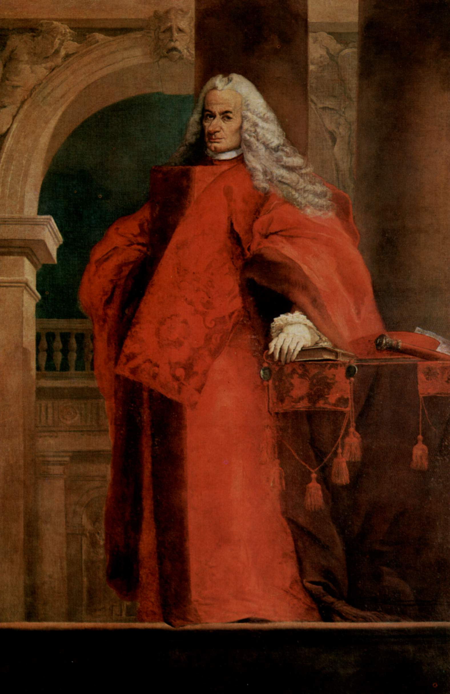 Porträt eines Prokurators